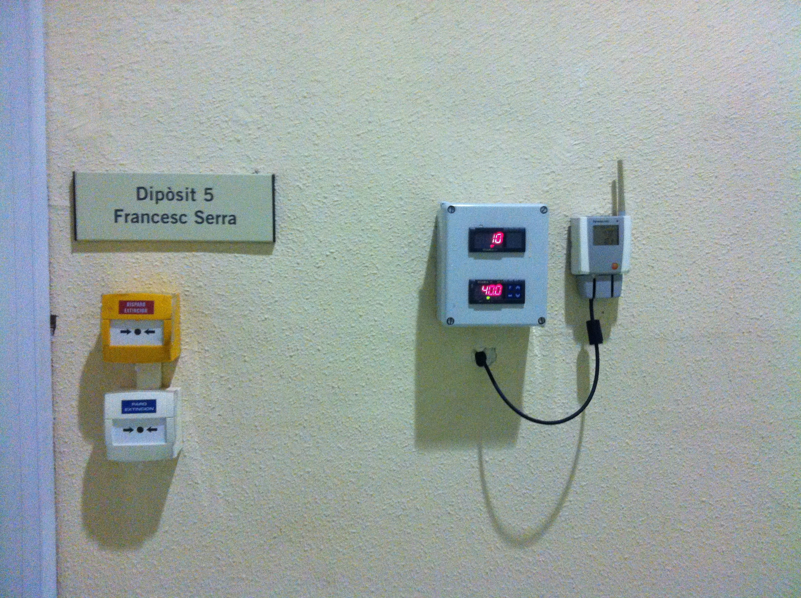 Magatzems de l'Arxiu Fotogràfic de Barcelona